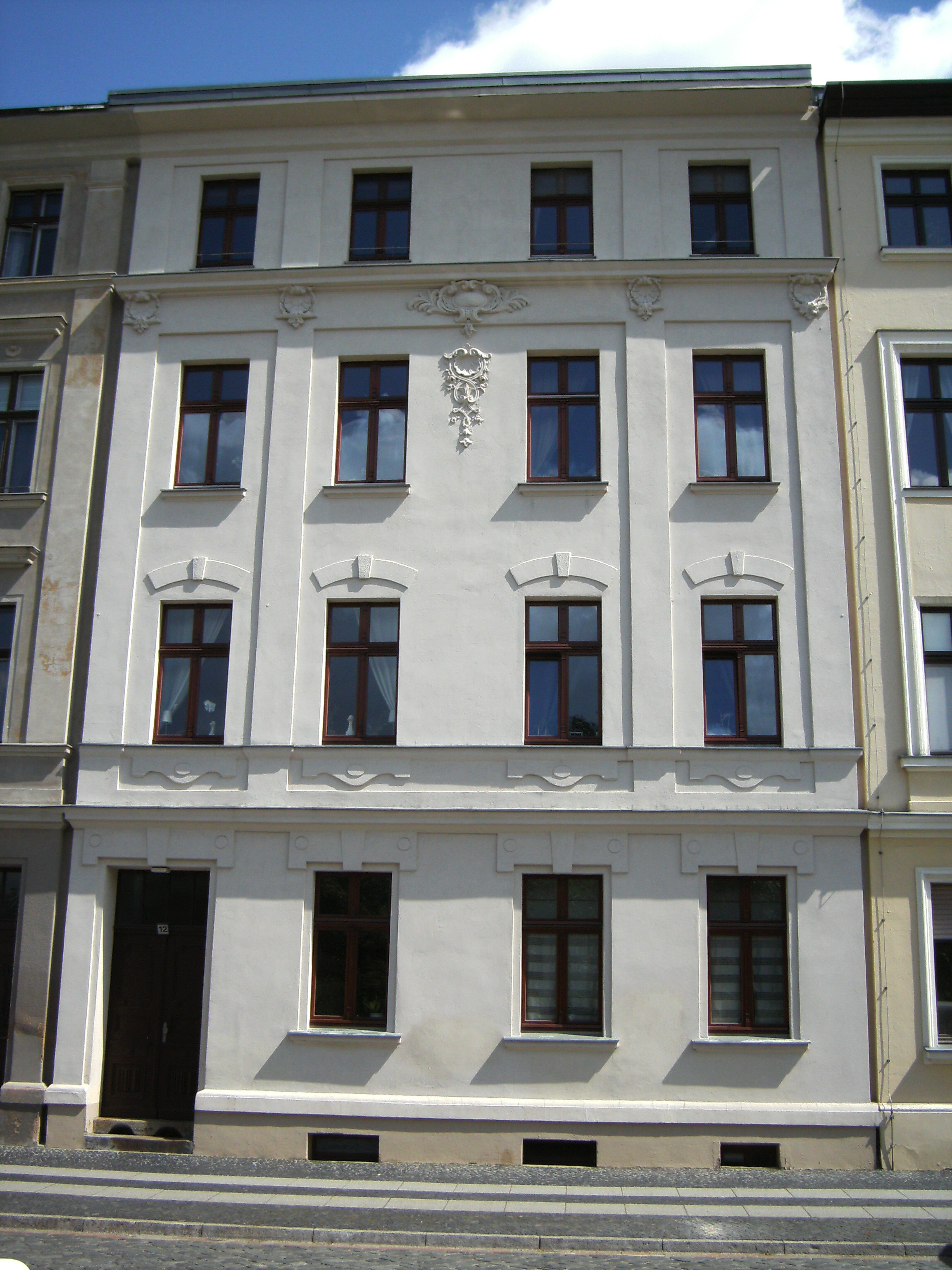 Wernerstr. 12